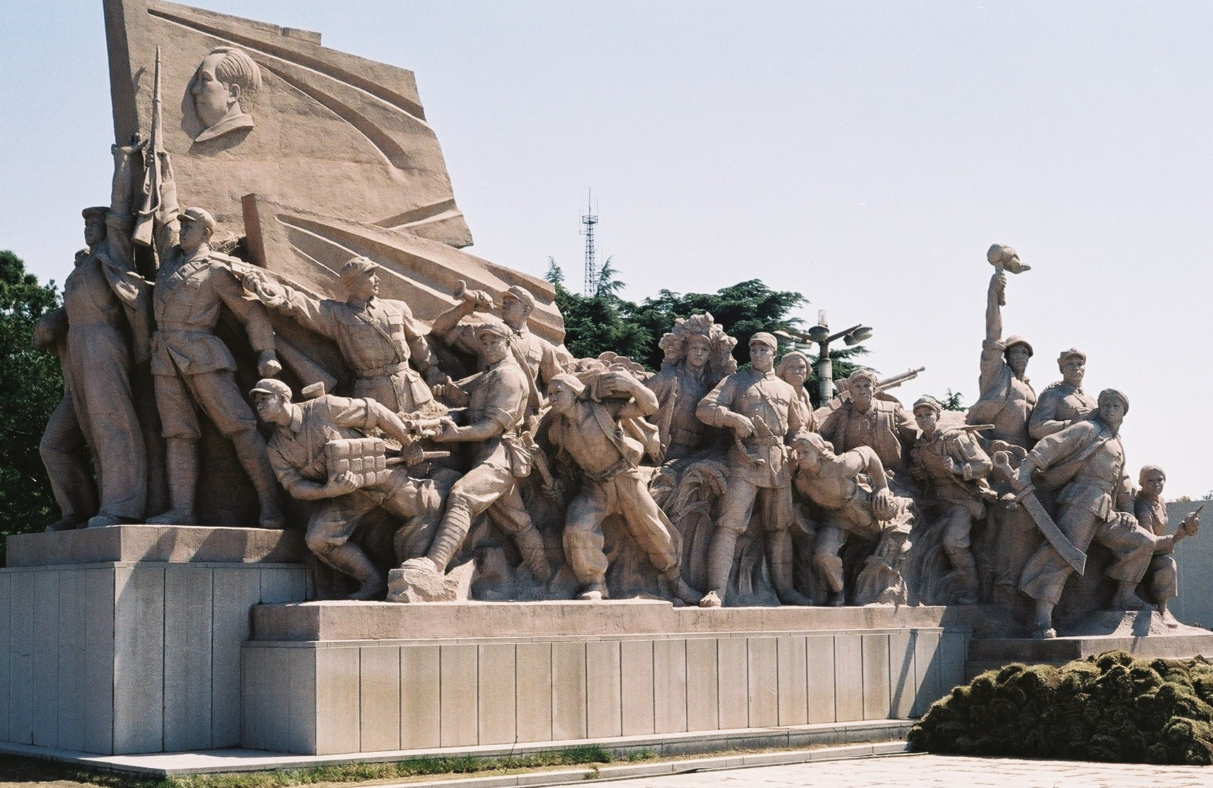 Sculpture du Mausolé de Mao, Pékin